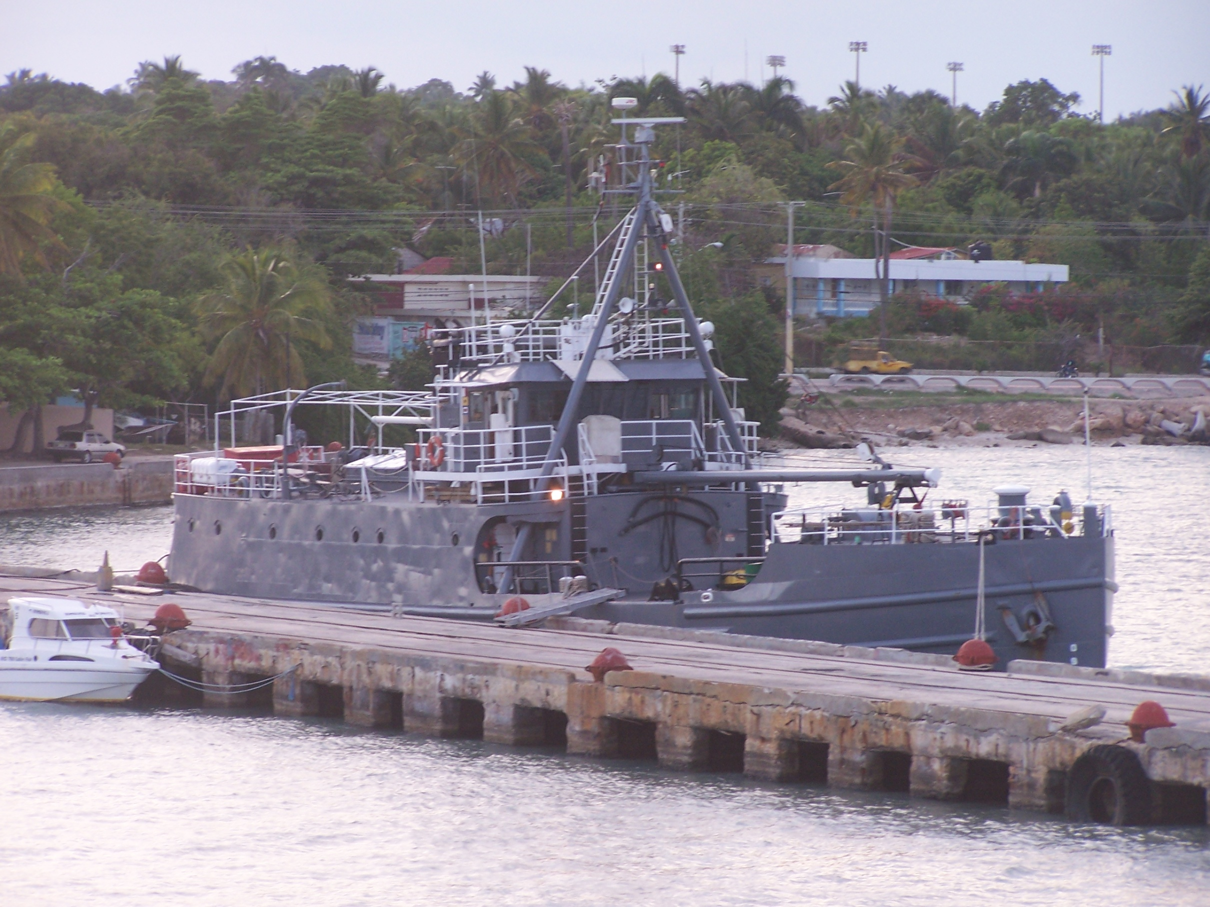 Patrullero Capotillo (PA-204)